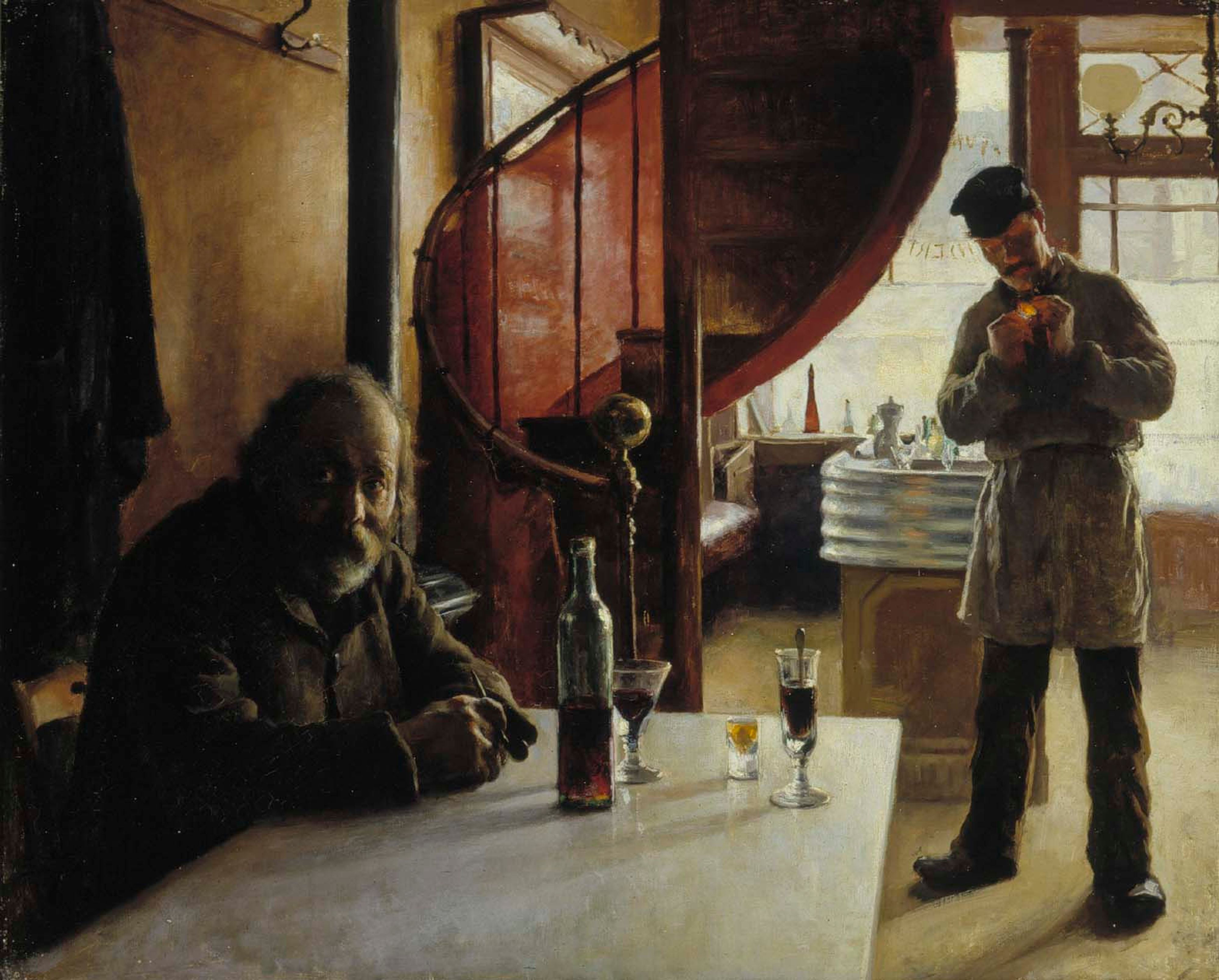 Le Franc, Wine Merchant, Boulevard de Clichy, Paris